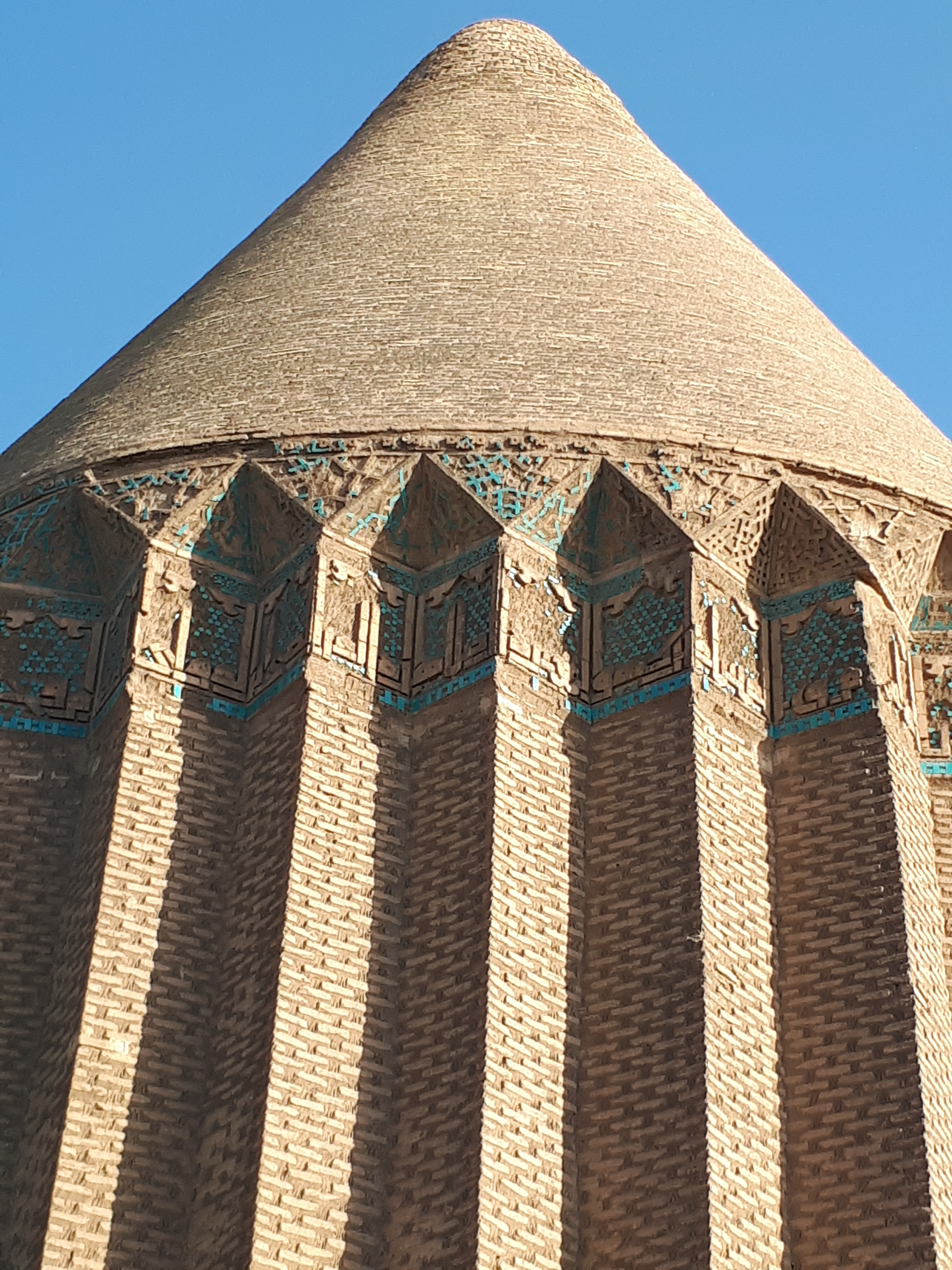 معماری دوره ایلخانیان